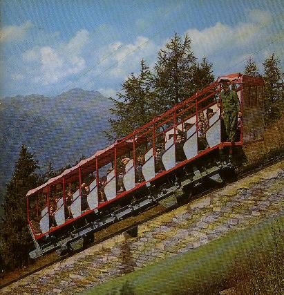 Standseil